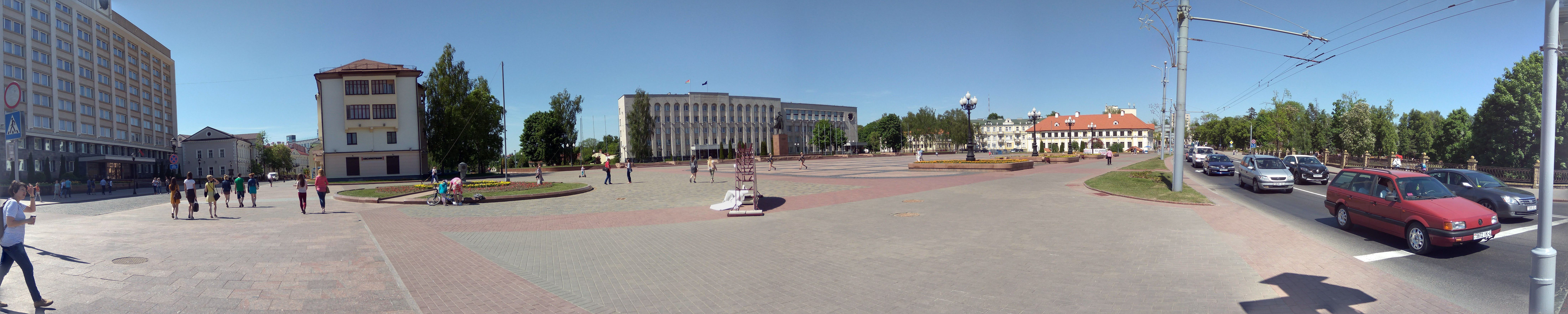 Гродна. Плошча Леніна (панарама)